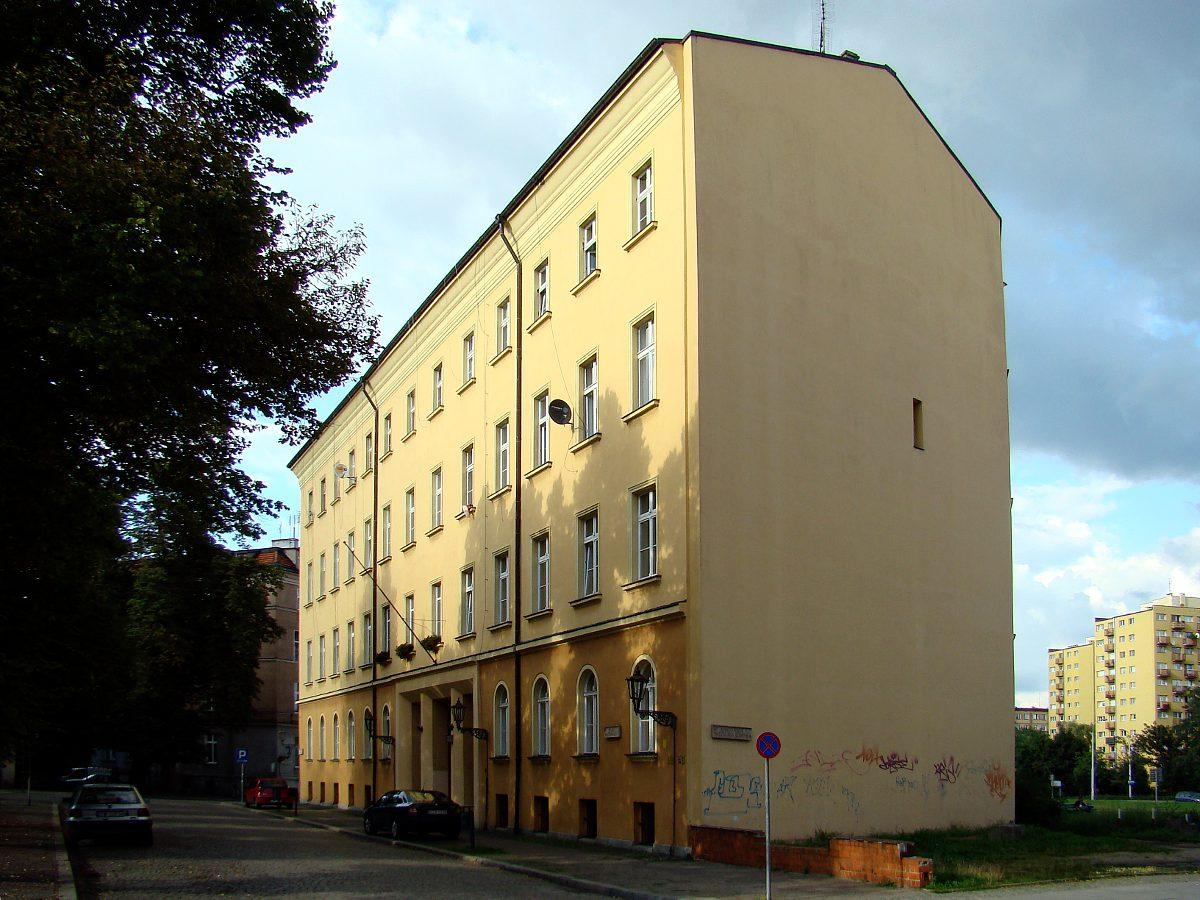 Plac Katedralny 11-12.